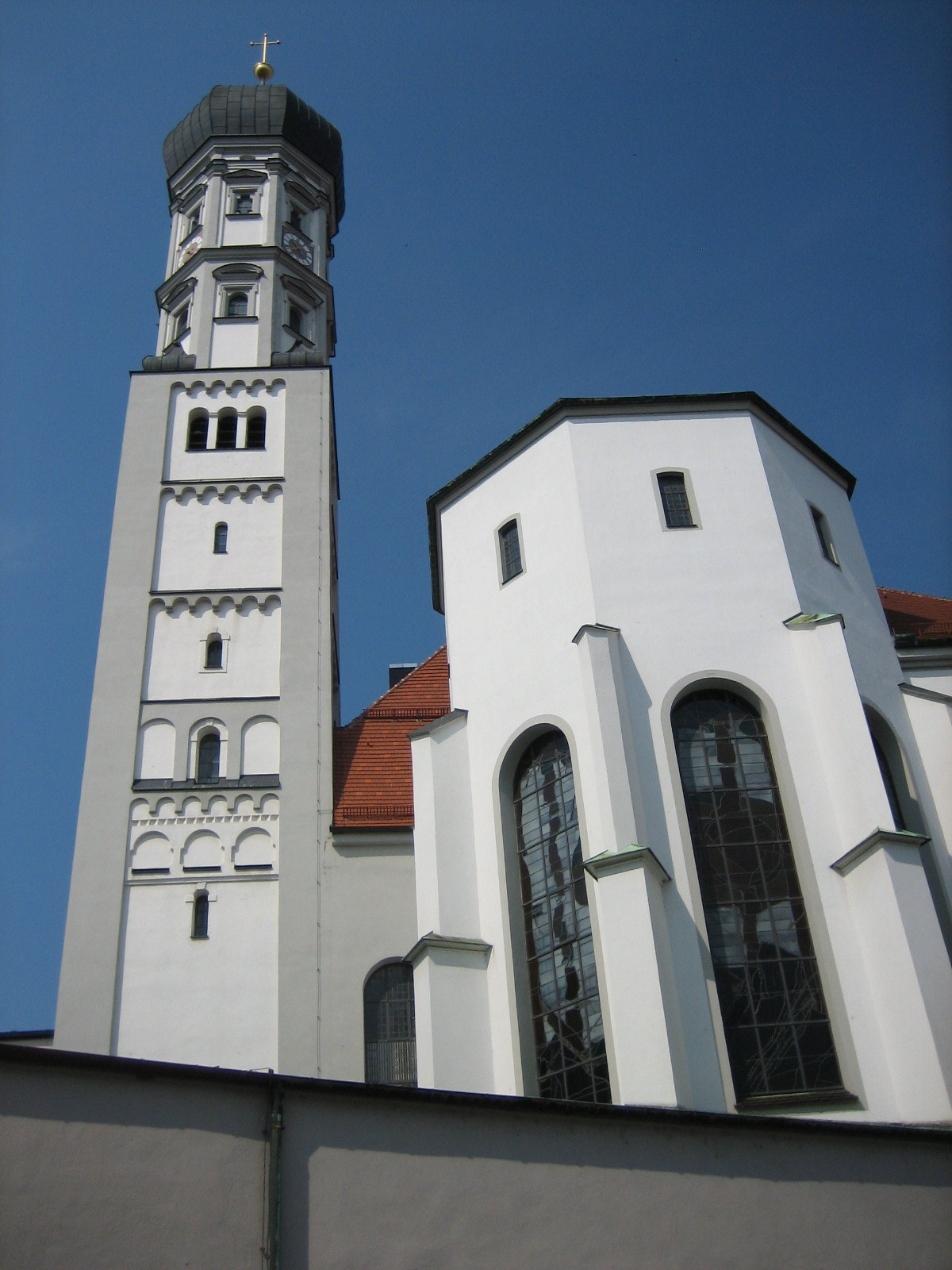 Katholische Heiligkreuz-Kirche in Augsburg